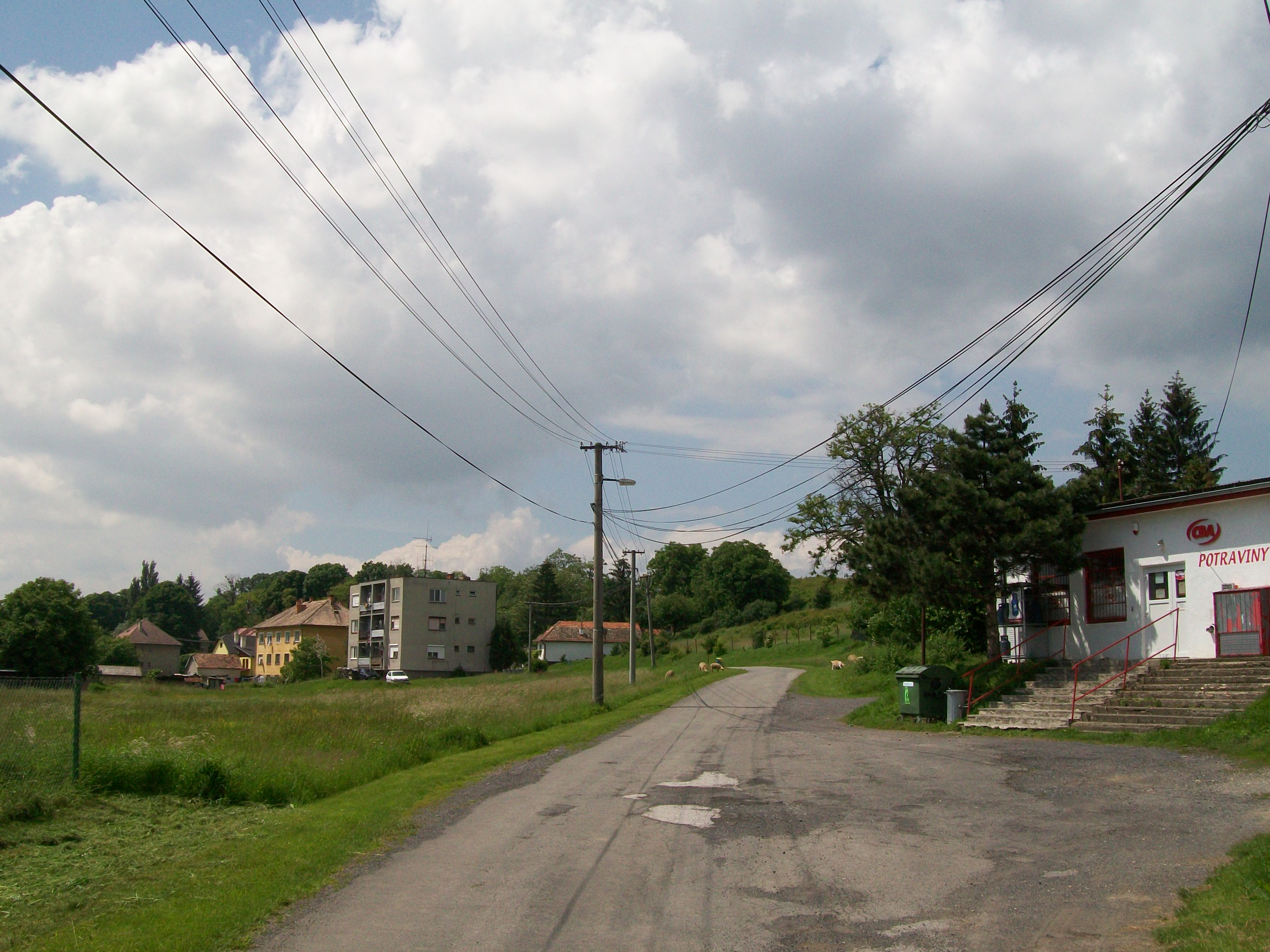 Ulica v obci Nové Hony